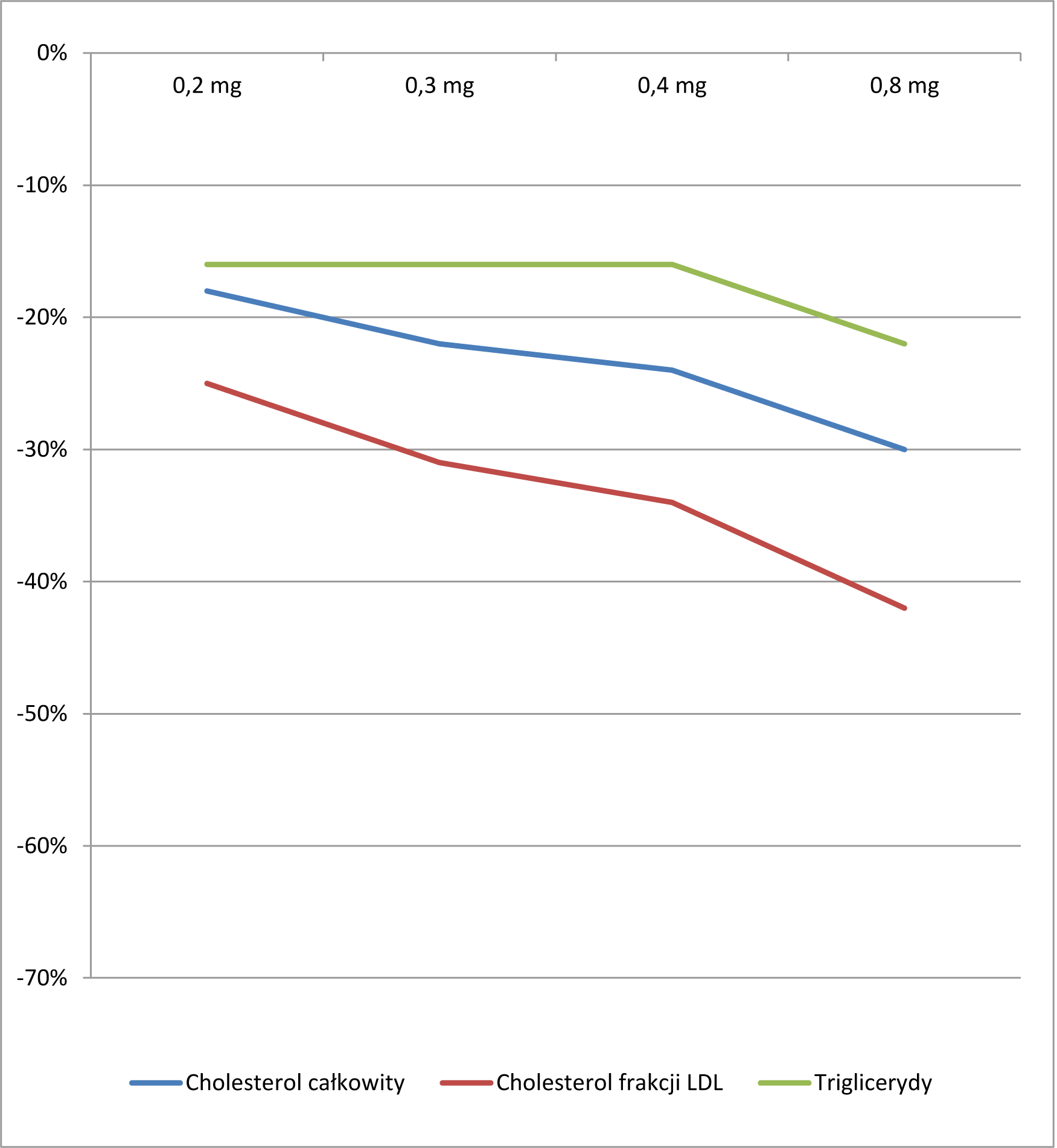 Wpływ ceriwastatyny na wskaźniki lipidowe (dane do wykresu za BAYCOL (cerivastatin sodium tablets))